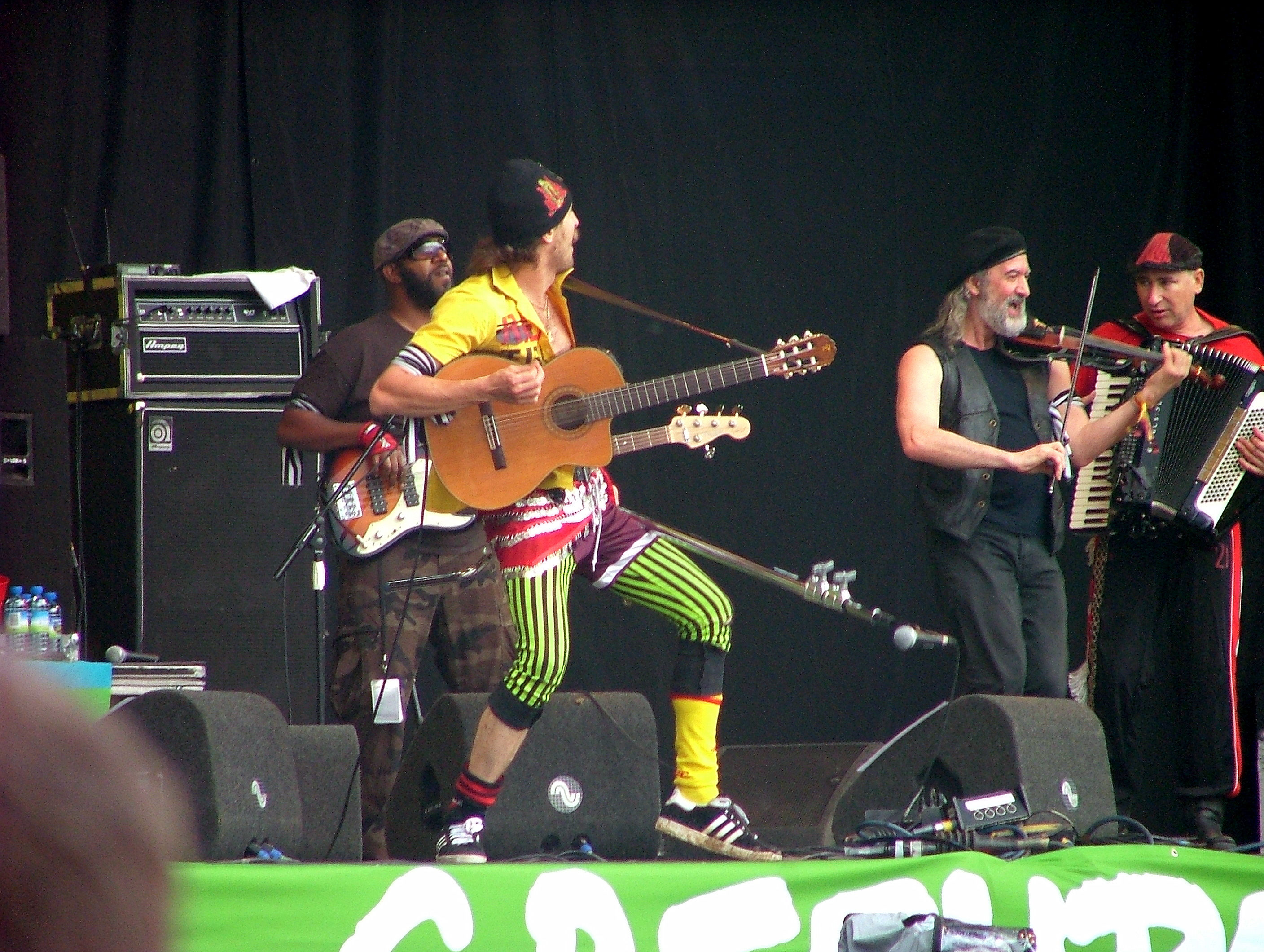 Gogol Bordello